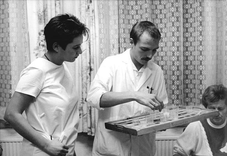 ADN-ZB Grubitzsch 9.11.89 Bez. Leipzig: Gesundheitswesen - Ihre "zweite Schicht" beginnt Medizinstudentin Christiane Sauer. Sie gehört zu den 20 Studenten ihrer Seminargruppe von der Karl-Marx-Universität Leipzig, die sich entschlossen, nach ihren täglichen Lehrveranstaltungen abwechselnd auf drei Stationen im Fachkrankenhaus für Neurologie und Psychiatrie Altscherbitz (Landkreis Leipzig) zu arbeiten.